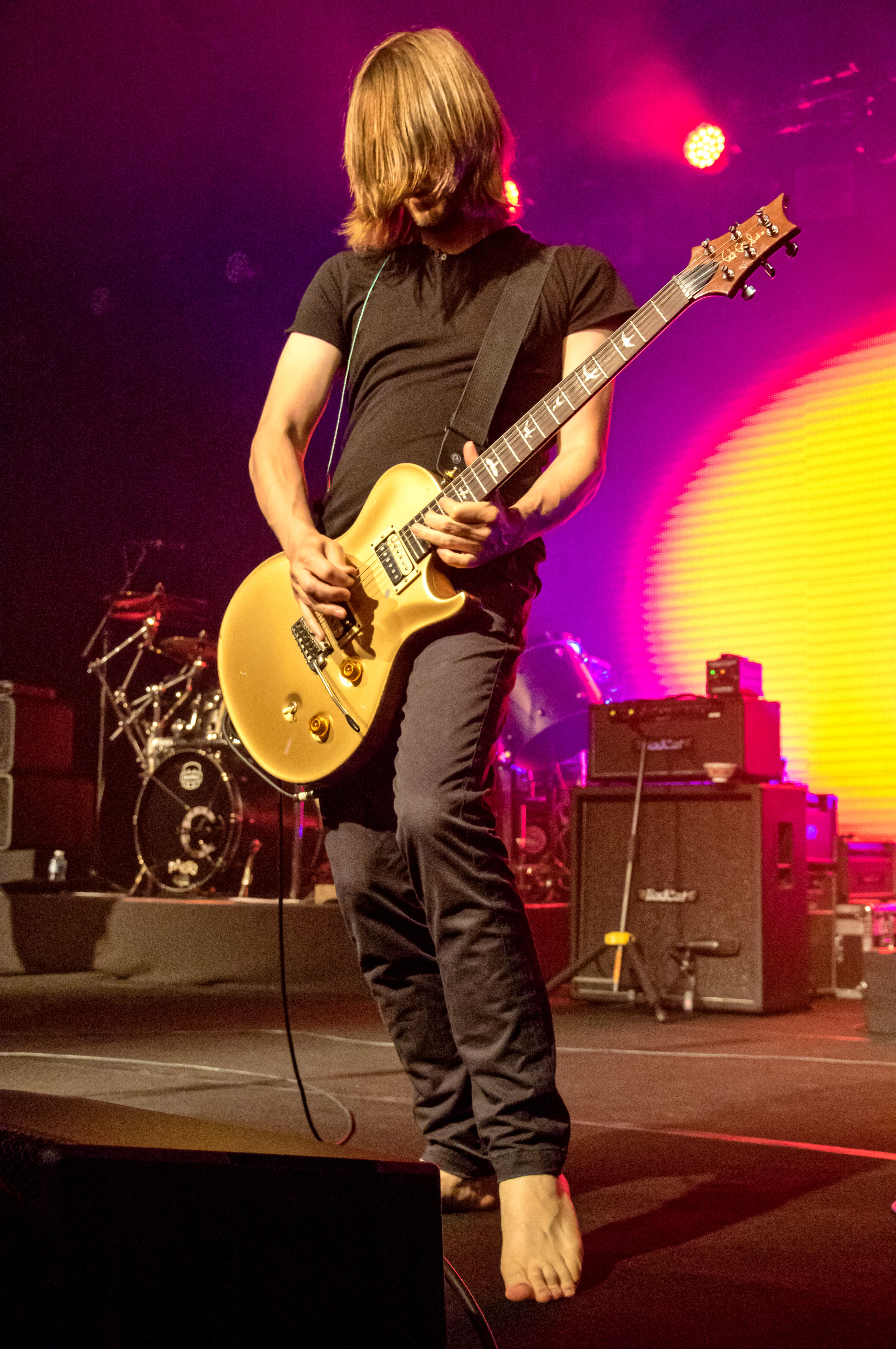 Bilder vom Zelt Musik Festival 2016 in Freiburg im Breisgau Steven Wilson